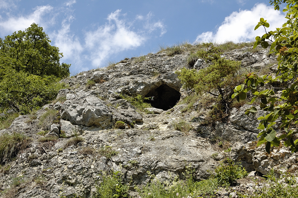 Zwergenloch 2921/12